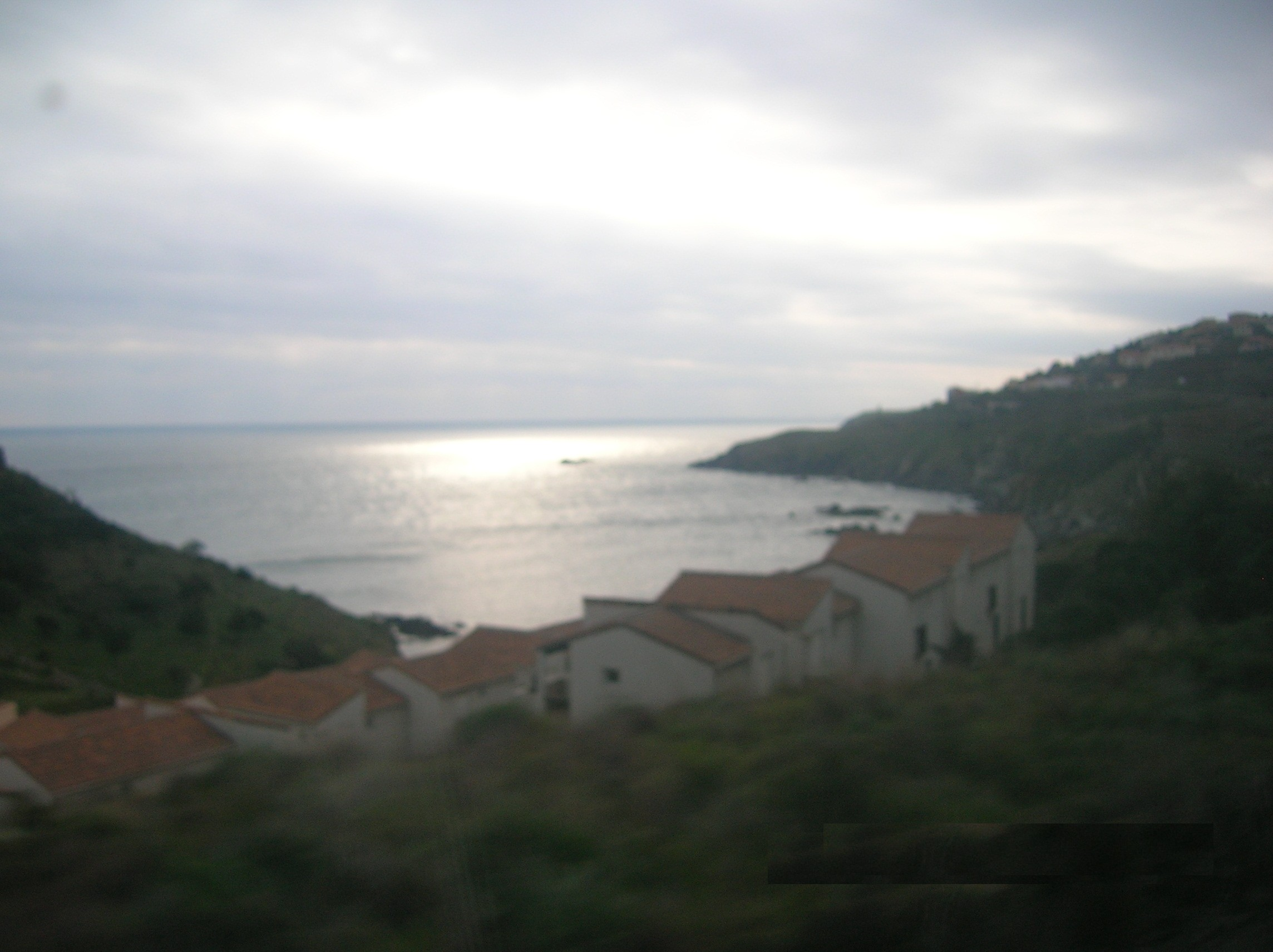 La Costa Brava (en algún lugar cercano a Portbou, Gerona)